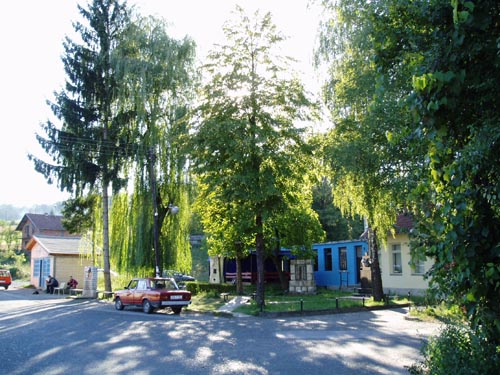 Kakmuž